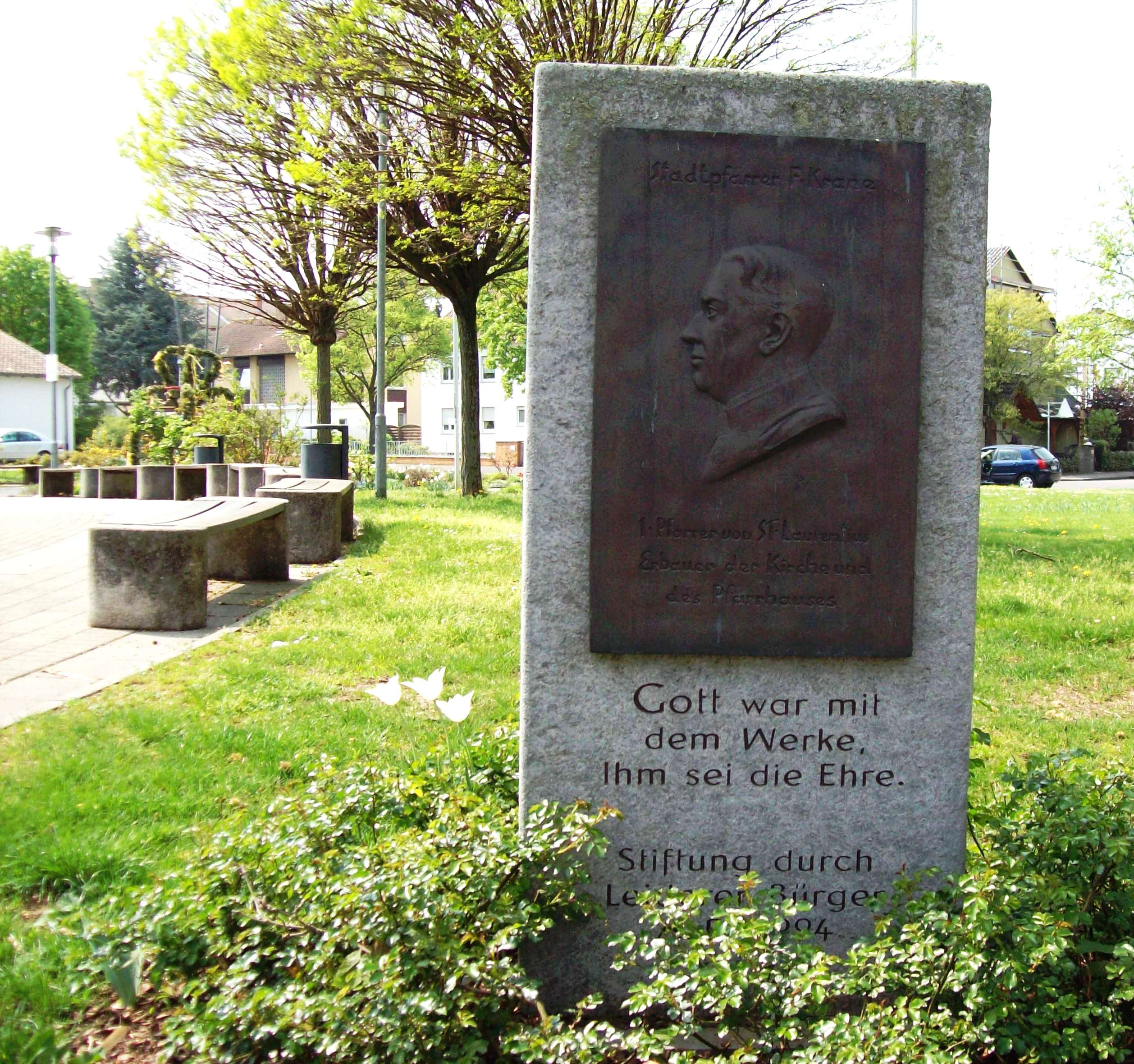 Gedenktafel für Pfarrer Krane in Aschaffenburg-Leider am Friedrich Krane-Platz, "Gott war mit dem Werke, Ihm sei die Ehre" war ein Ausspruch von ihm bei Einweihung der St. Laurentius-Kirche. Bronzeabguß der Gedenkplatte im Innern der Kirche. Stiftung durch Leiderer Bürger A.D. 1994.(Stadtpfarrer F.Krane, 1. Pfarrer von St. Laurentius Erbauer der Kirche und des Pfarrhauses)